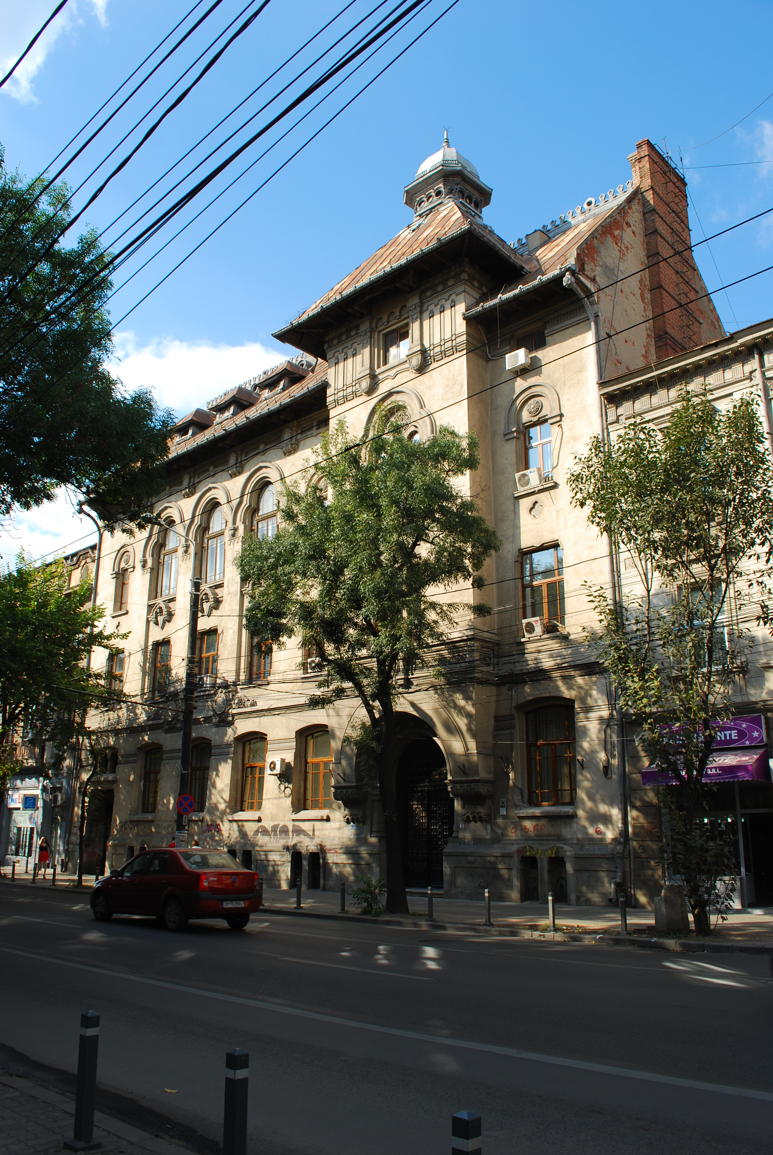 Casa Corpului Didactic din Bucureşti, România